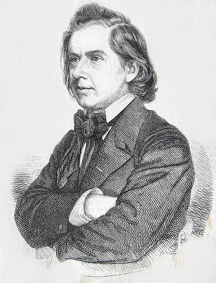 Niels Wilhelm Gade som 43-årig